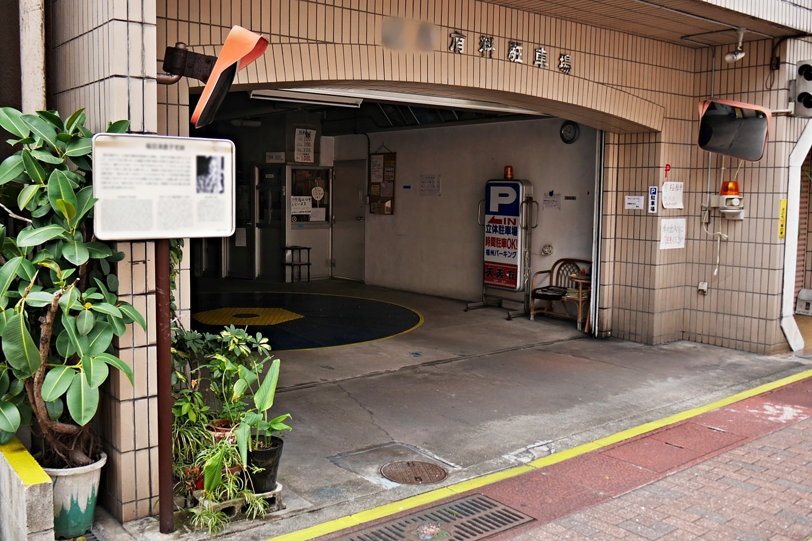 長崎の詩人、福田須磨子の自宅跡地。